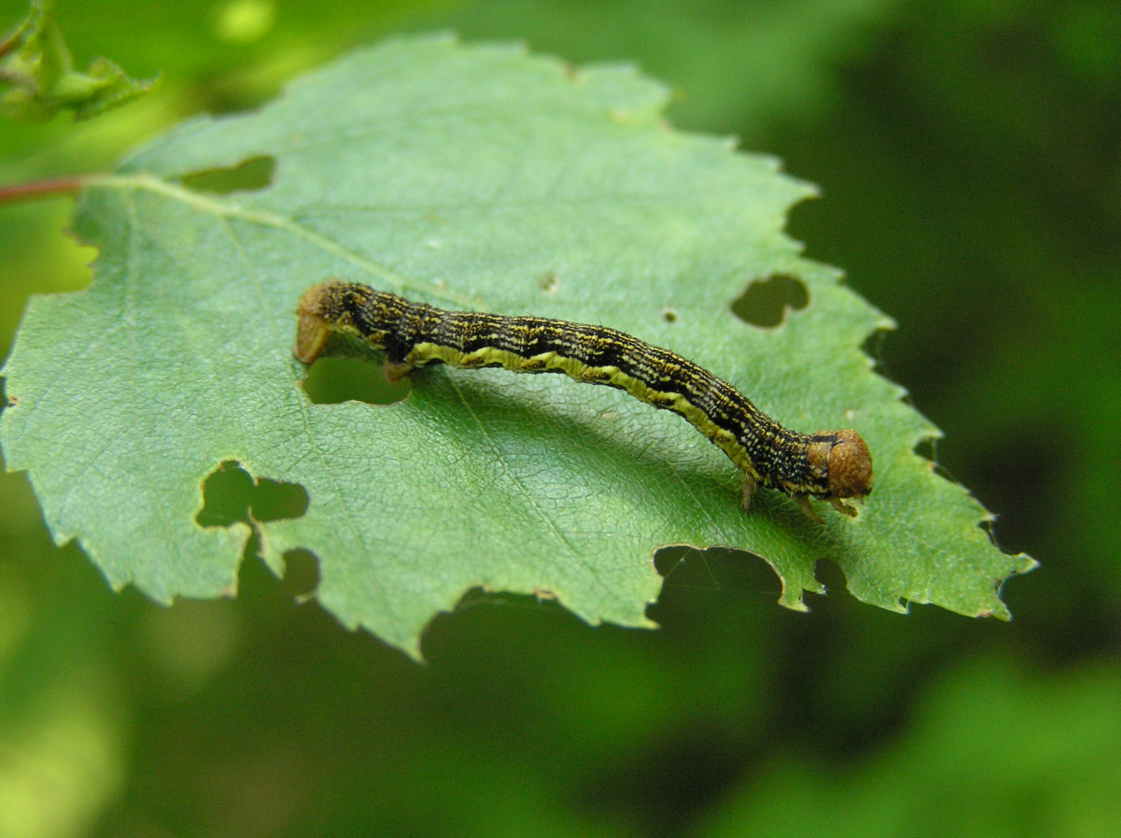 larve Erannis defoliaria